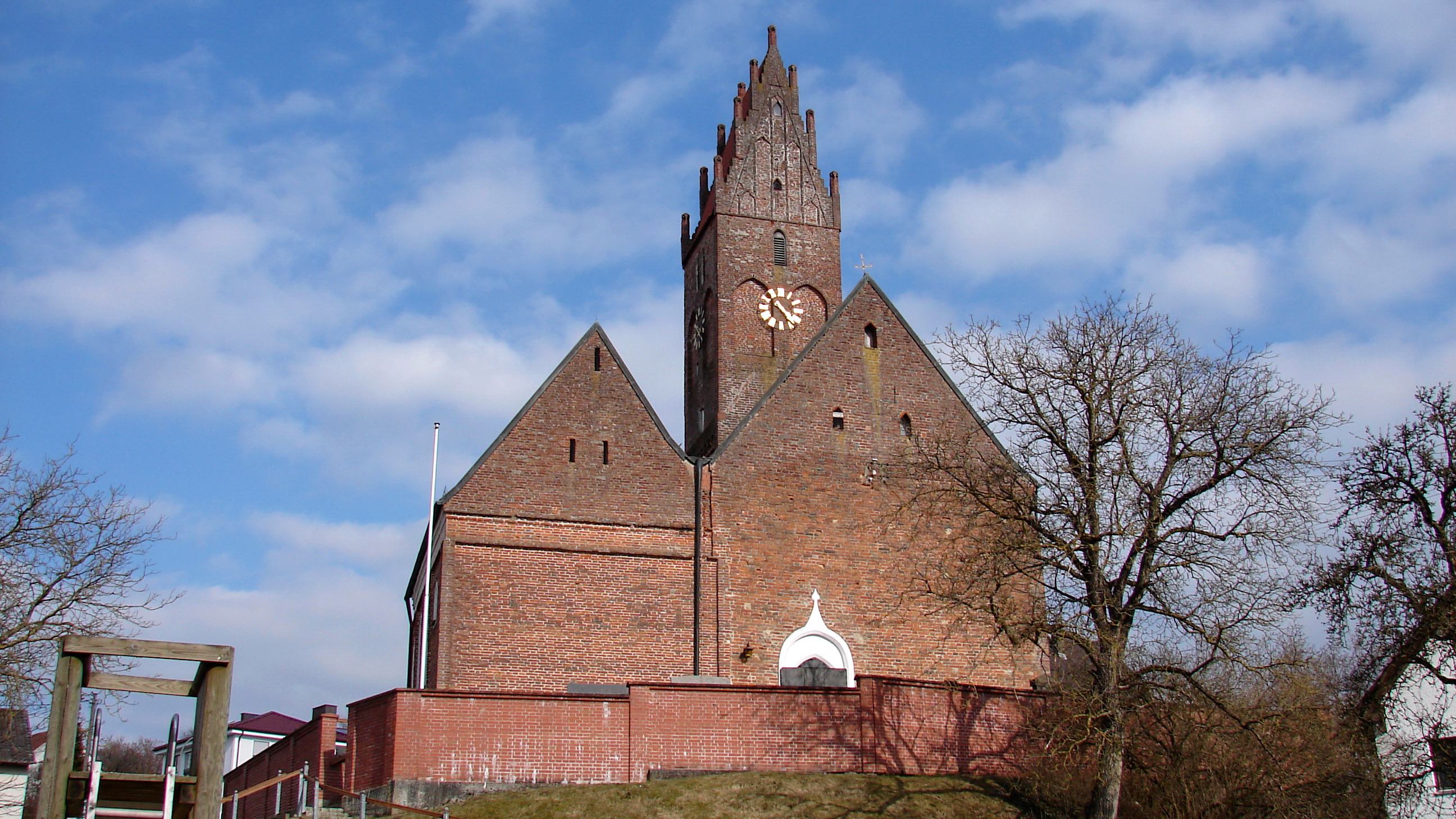 Die römisch-katholische Pfarrkirche St. Peter und Paul ist eine romanische, in spätgotischer Zeit zur Hallenkirche umgebaute Saalkirche in Ebrantshausen.